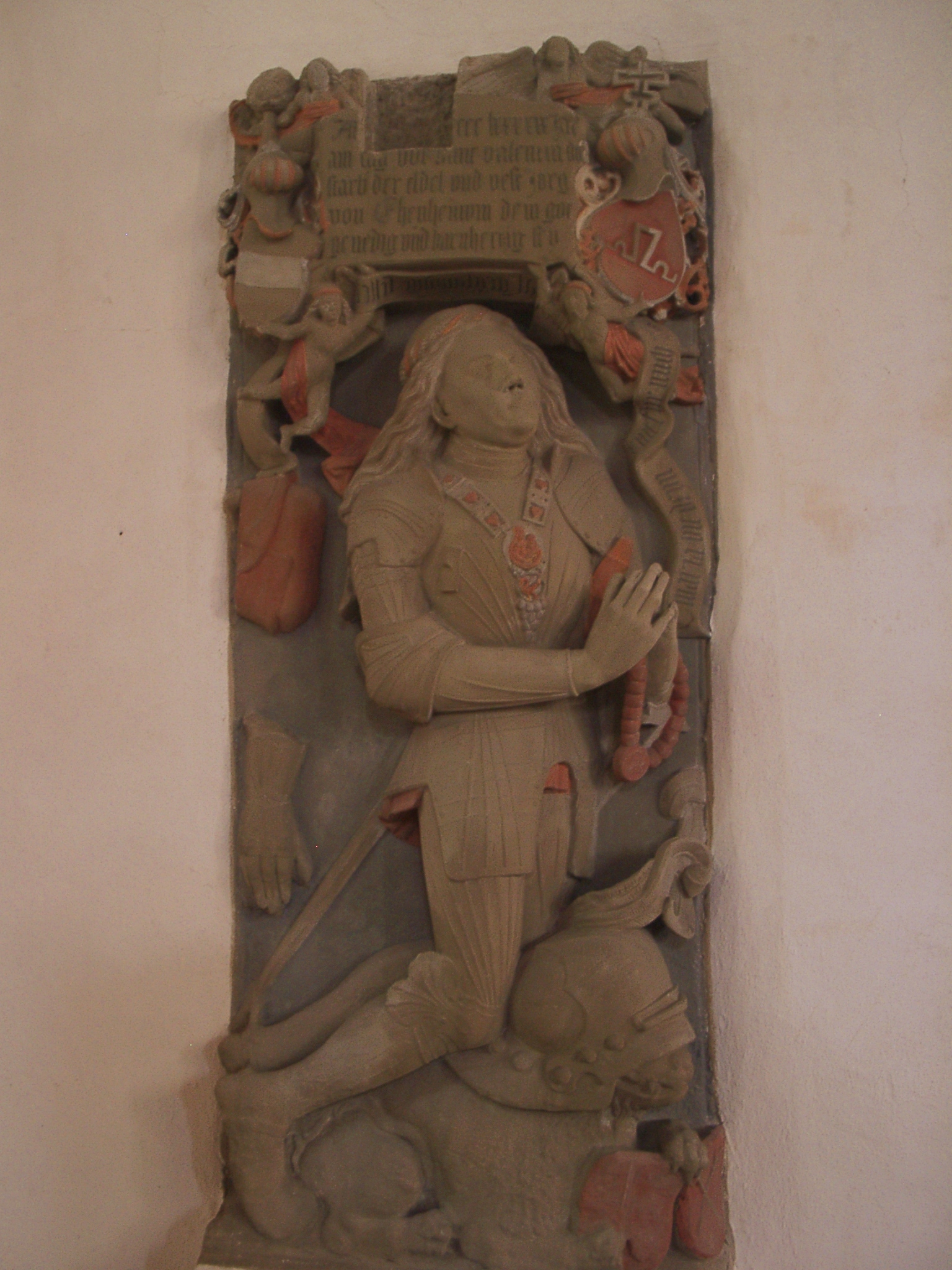 Feuchtwangen, Ritter des Schwanenordens